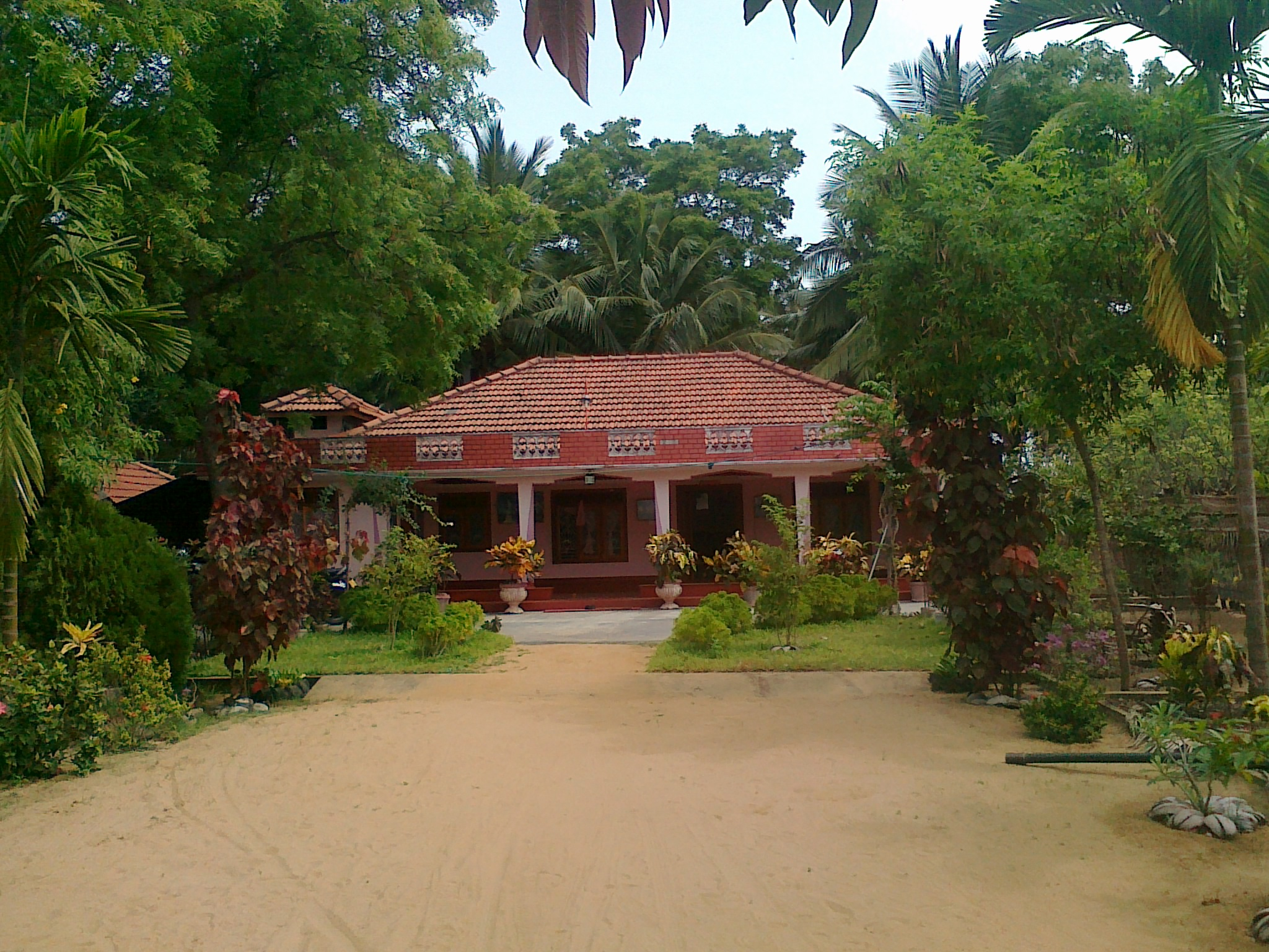 இயற்கை வளம் மற்றும் குருமணல்